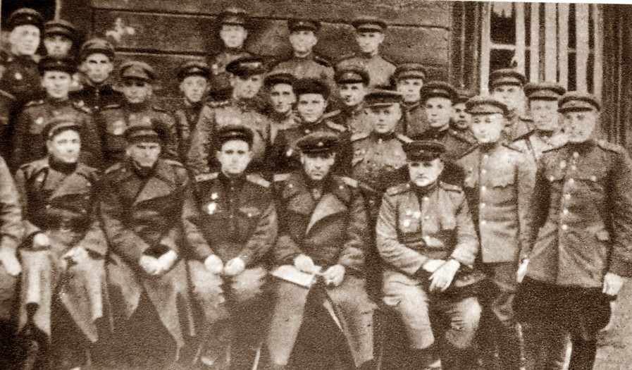 82 dywizja piechoty gwardii z dow. pułków i batalionów; przczółek magnuszewski, 7.11.1944